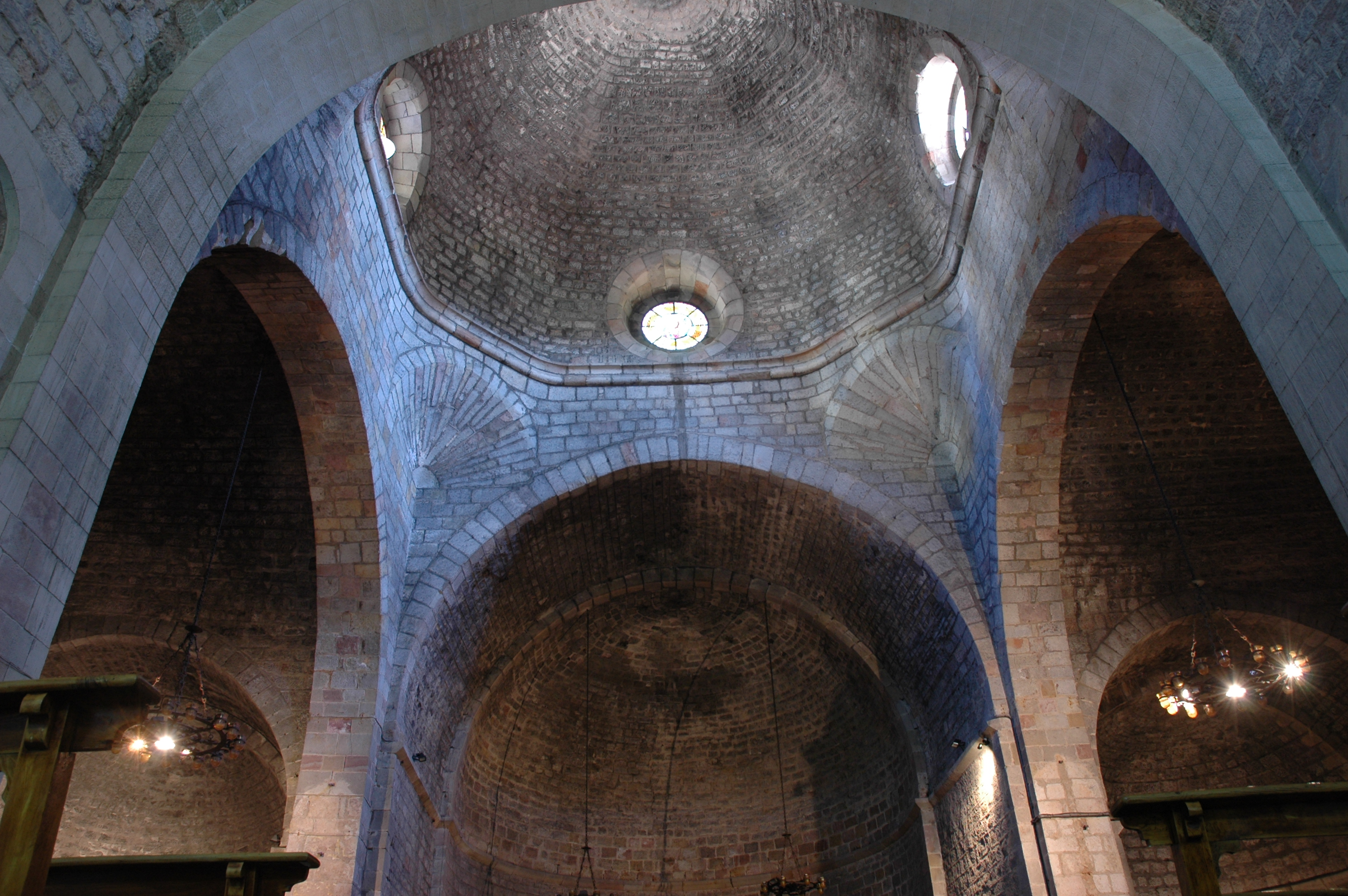 Sant Pau del Camp - Interior